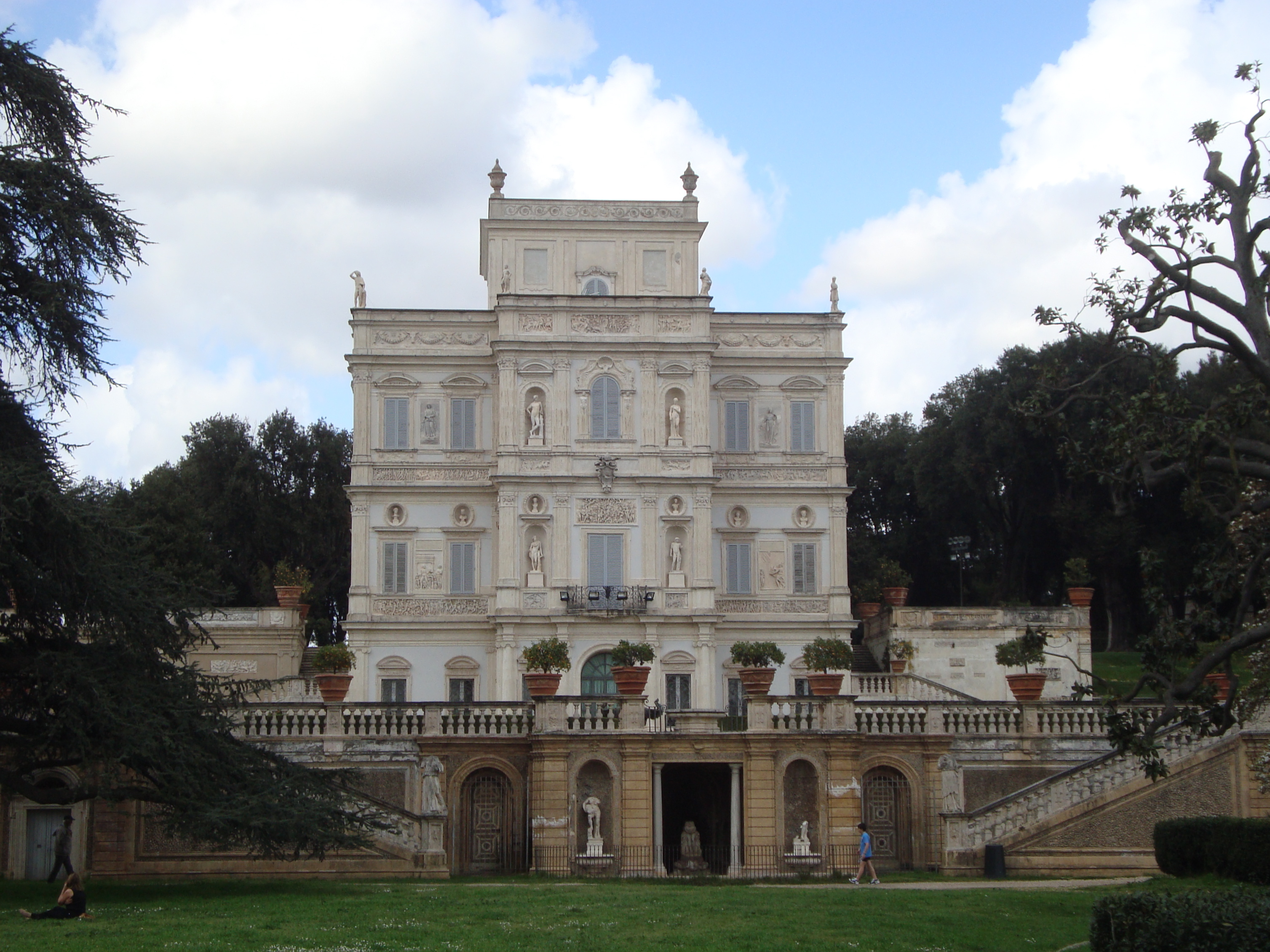 Le palais del Bel Respiro de la villa Pamphili